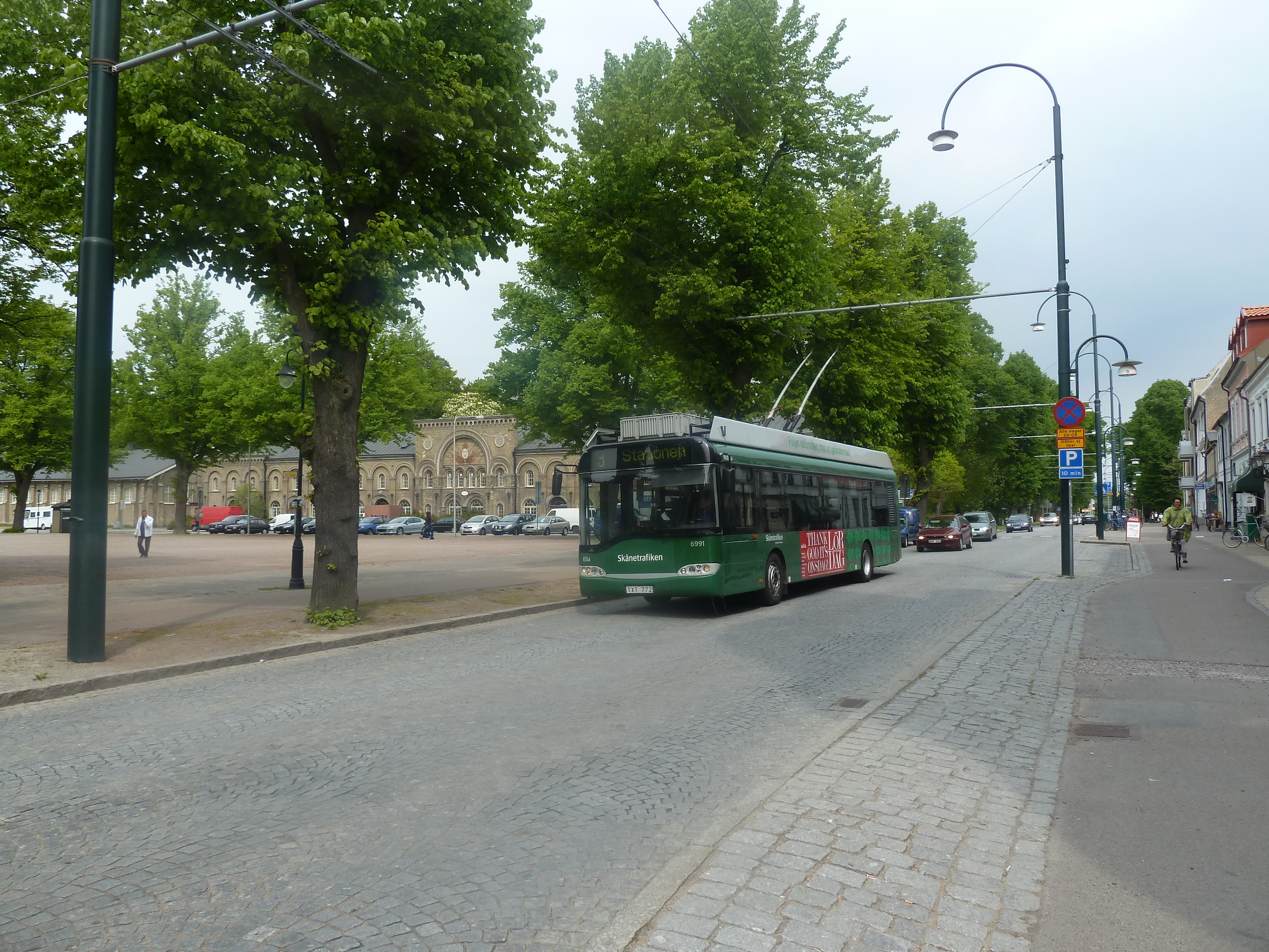 Trolleybus 6991 "Ella" on Eriksgatan in Landskrona.